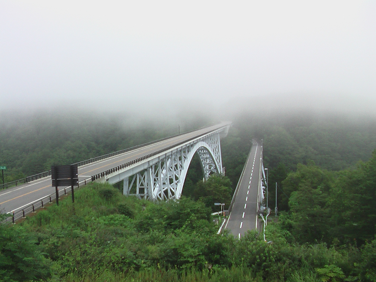 思案坂大橋（左）と真木沢橋（右）